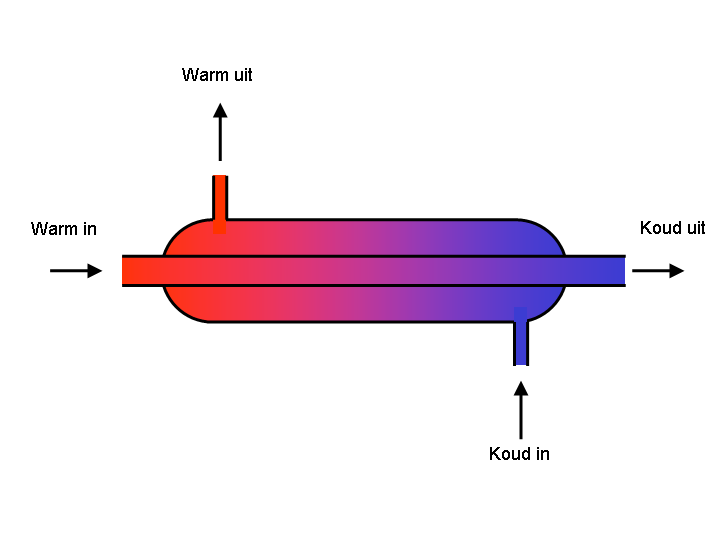 liebigkoeler - eigen werk - publiek domein